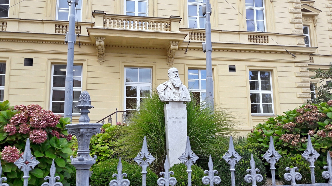 Brno, přestavba nádraží